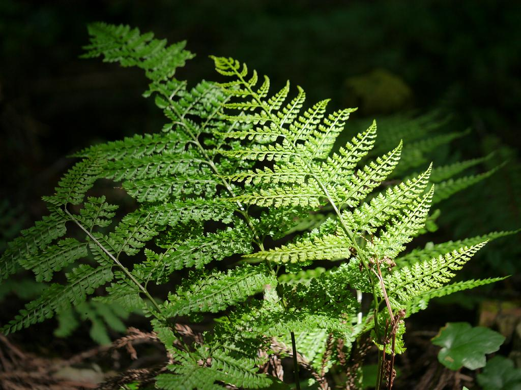 Arachniodes standishii：リョウメンシダ 2014/09/15 和歌山県田辺市：Tanabe City. Wakayama Pref. Japan